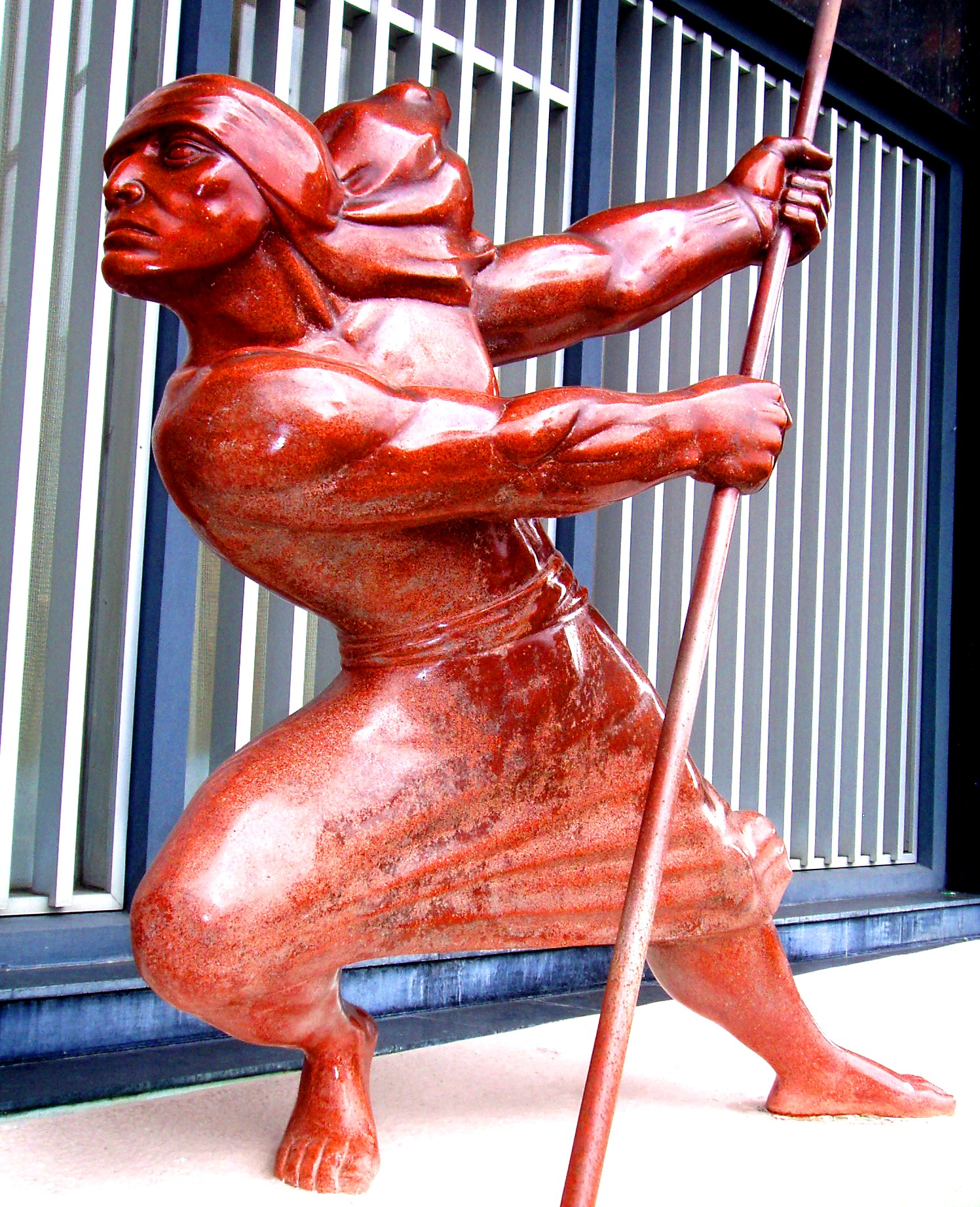 Boga Ambigues (Ibague)